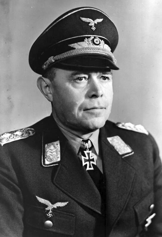 Albert Kesselring ADN-Zentralbild-Archiv Ehemaliger Generalfeldmarschall Kesselring 6964-40 Scherl Bilderdienst [Albert Kesselring hier als General der Flieger mit Ritterkreuz, Aufnahme 1940] Abgebildete Personen: Kesselring, Albert: Generalfeldmarschall, Ritterkreuz (RK), Heer, Deutschland (GND 118722050)